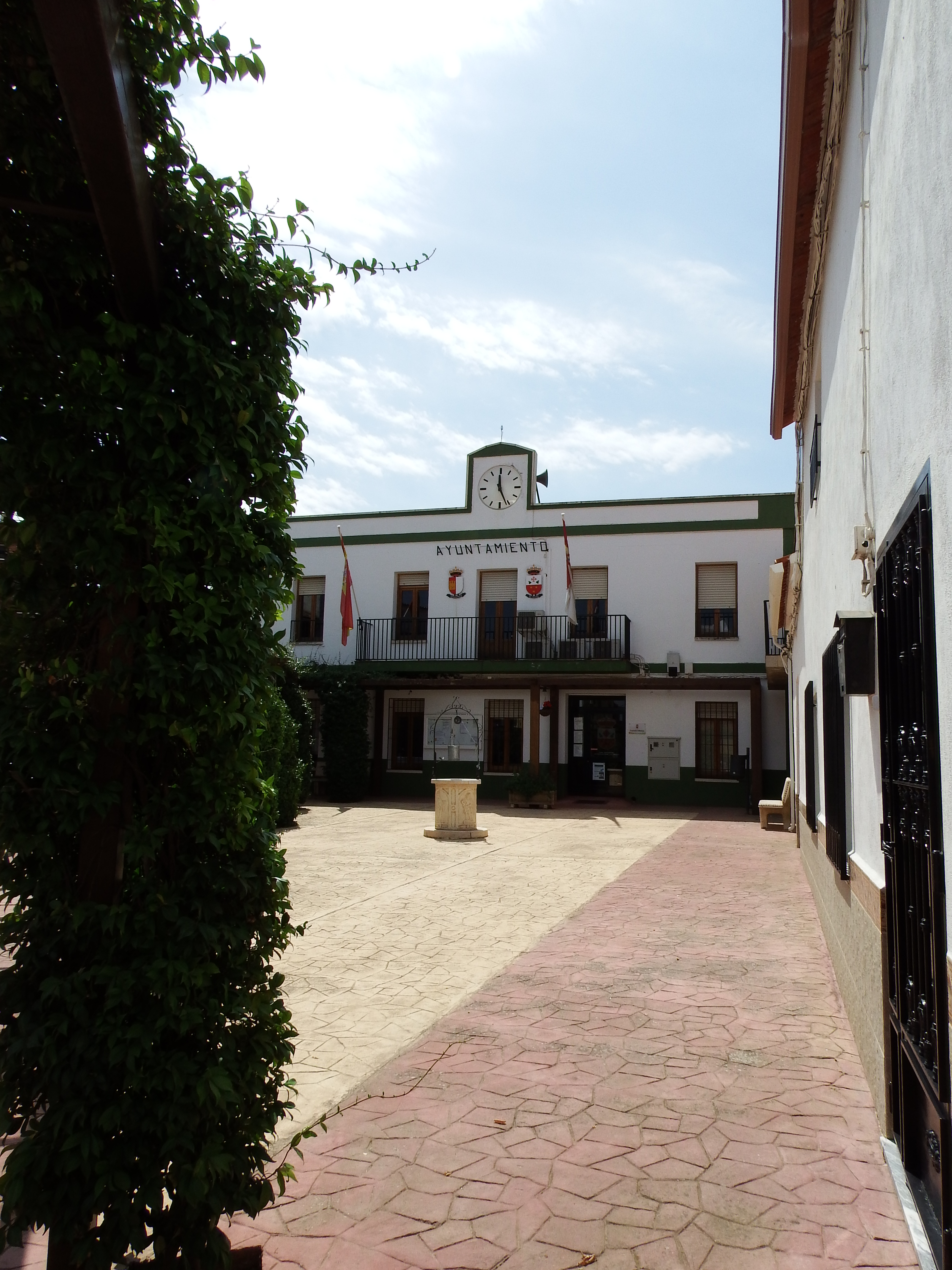 Los Pozuelos de Calatrava, Ayuntamiento.